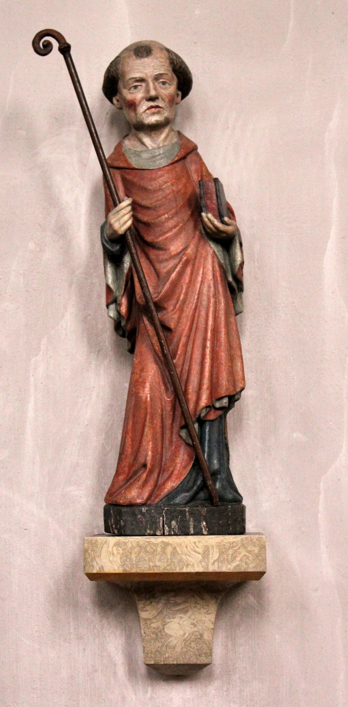 Die Figur des Hl. Bischofs Erhard an der nördlichen Langhauswand der St. Nikolaus-Kirche in Veringenstadt ist die älteste Figur der Kirche. Sie entstand um das Jahr 1410. Höhe 68 cm; Lindenholz; alte Fassung freigelegt und ergänzt. Vermutlich Arbeit eines unbekannten Veringer Bildhauers. Bischofsstab neu.